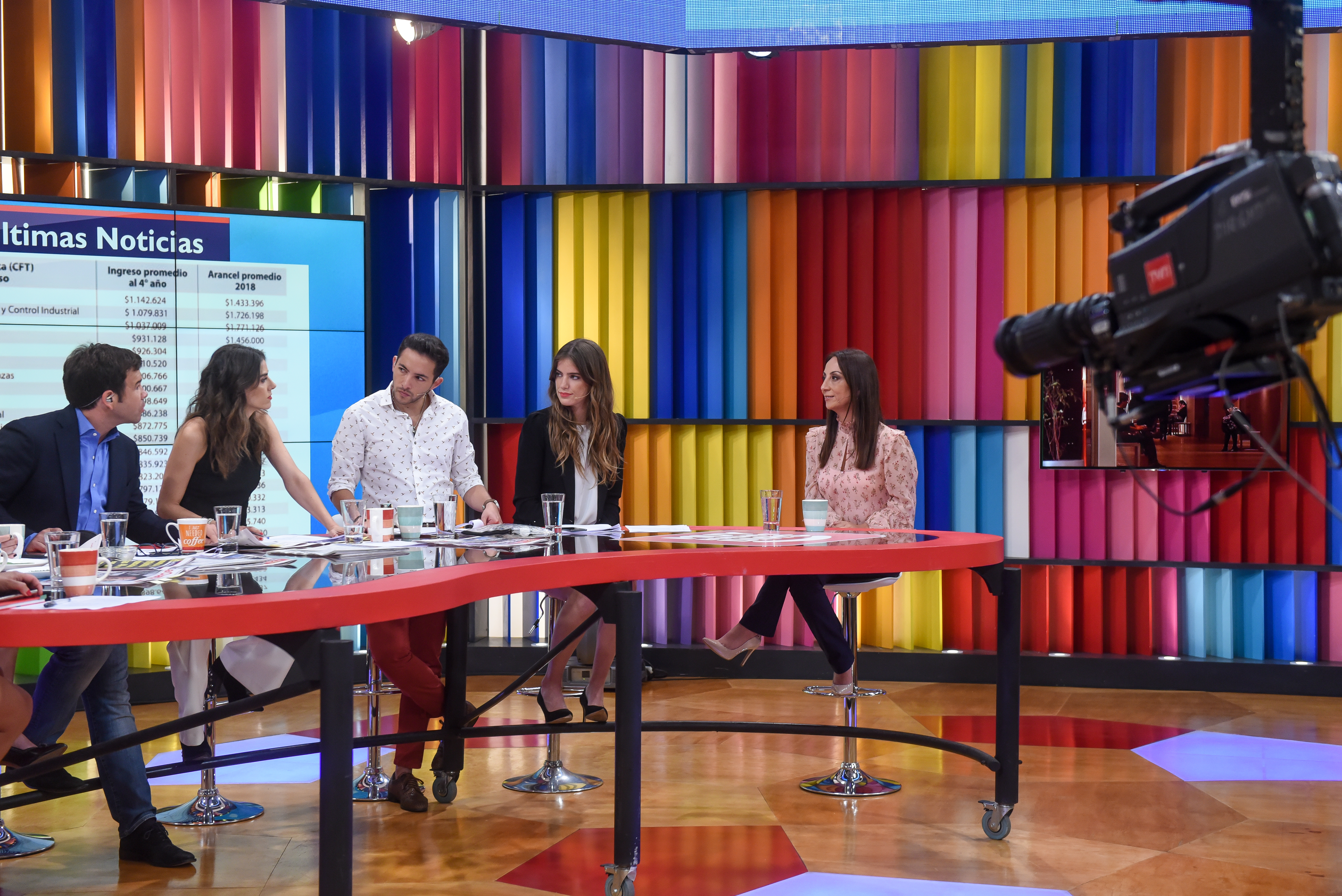 Cecilia Pérez visita programa Muy buenos días de TVN.